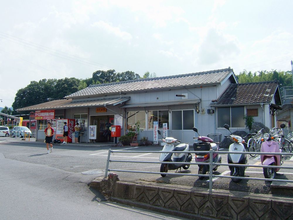 豊肥本線 中判田駅の駅舎。 2006年8月27日にGACHANが撮影しました。